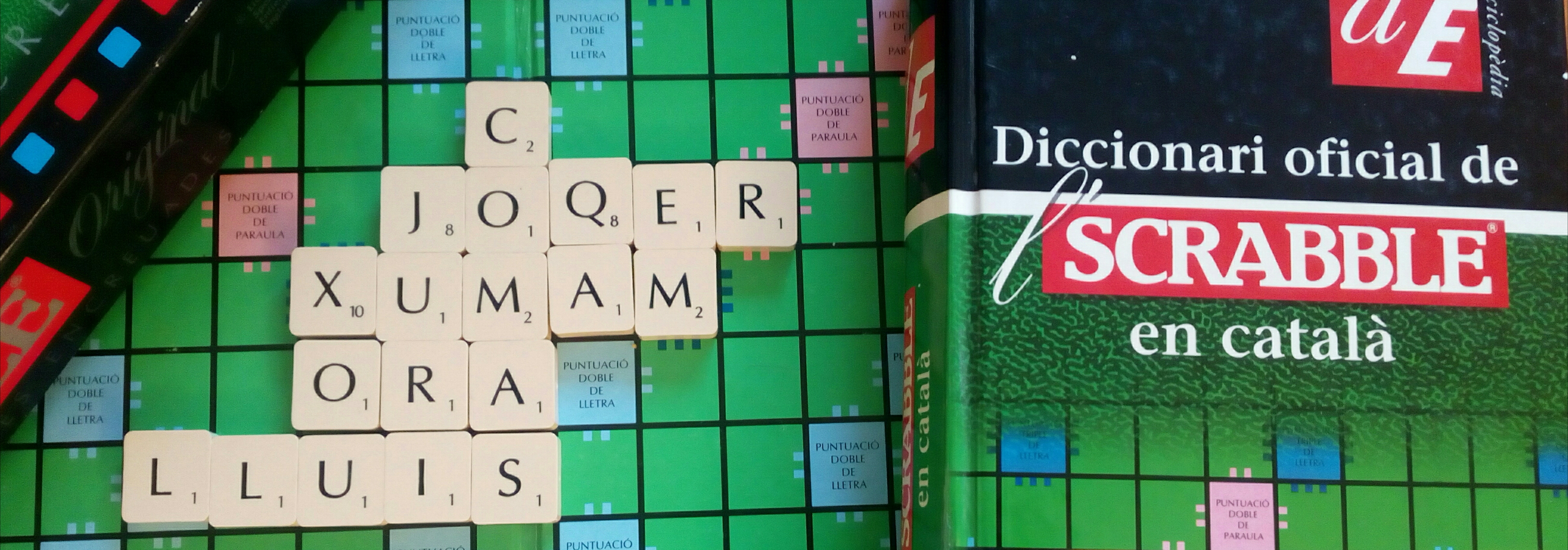 Partida d'escrable amb el noms COMAS i LLUIS, a més d'una forma baleàrica, un neologisme naturalitzat i l'ús de la Q com a dígraf.